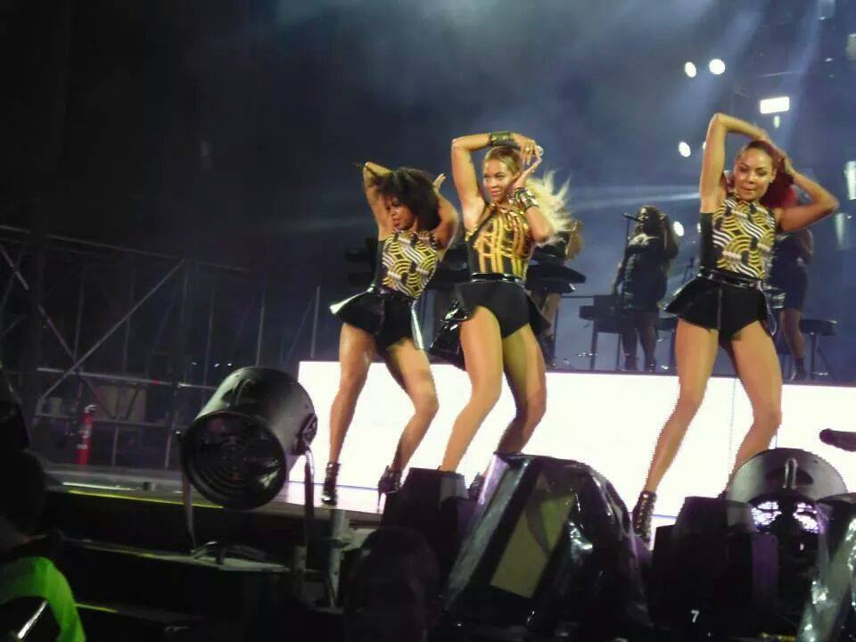 Beyonce durante el Mrs carter show world tour en Medellin colombia el 22 de septiembre del 2013 en el estadio atanasio girardot